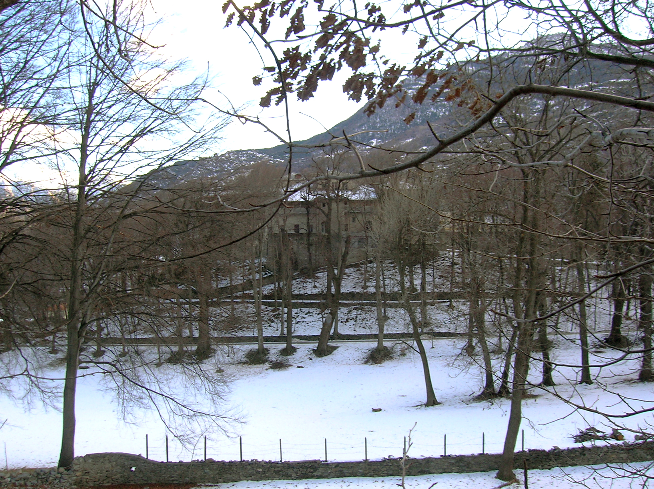 Il parco del Castello Passerin d'Entrèves, chiuso nel periodo invernale. Châtillon, Valle d'Aosta, Italia.